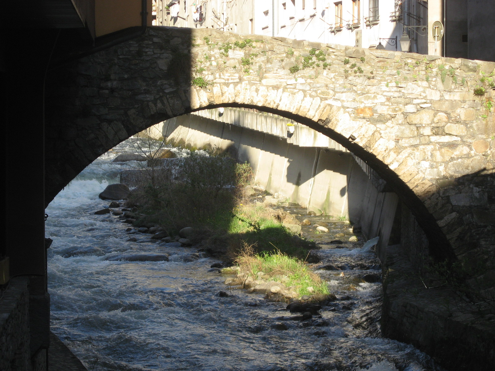 Pont d'Escaldes-Engordany